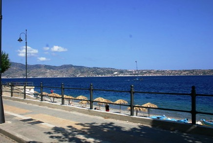 Il lungomare di cannitello vicino alla Chiesa